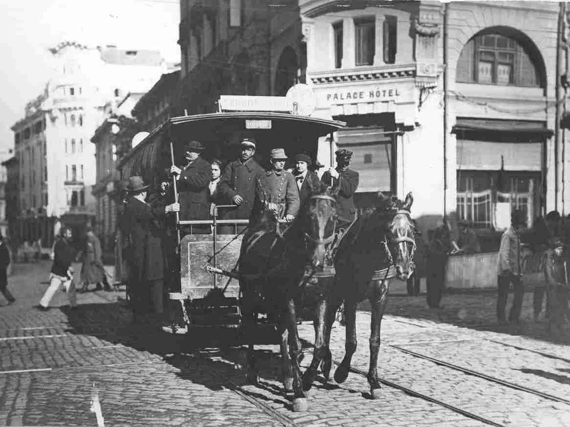 1871 : Se înfiinţează prima "Societate Română de Tramvaiuri", pe străzile Bucureştiului văzându-se primele tramvaie tractate de cai.